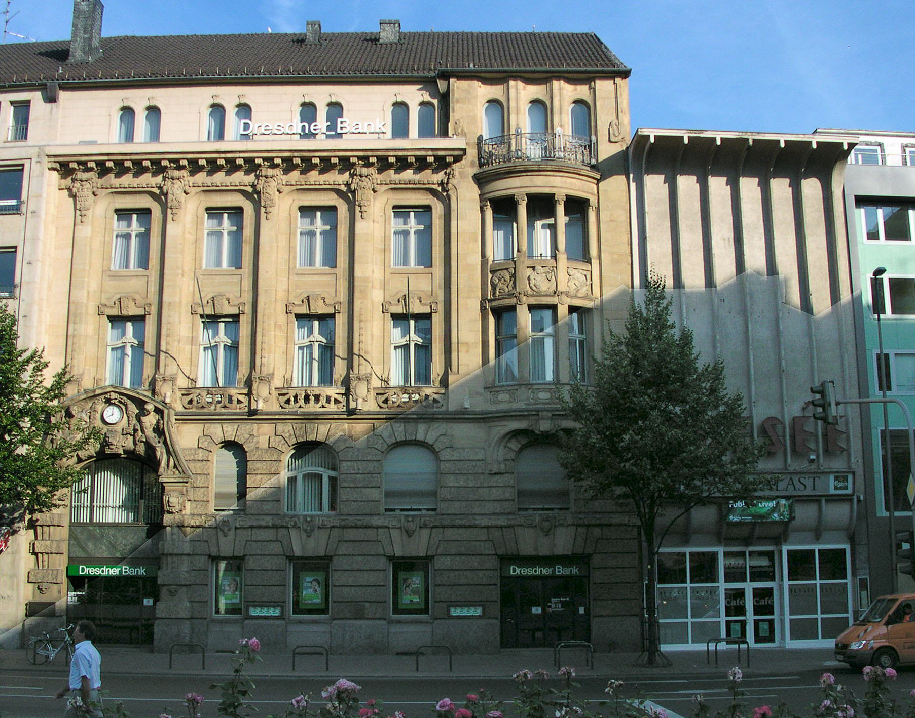 Aachen, Elysee-Kino und Dresdner Bank gegenüber dem Stadttheater. Vermutlich Bankgebäude für die Rheinisch-Westfälische Disconto-Gesellschaft AG in Aachen von Architekt Georg Frentzen. Der Schatten auf den Hauswänden wurde mittels Gammakorrektur bearbeitet.